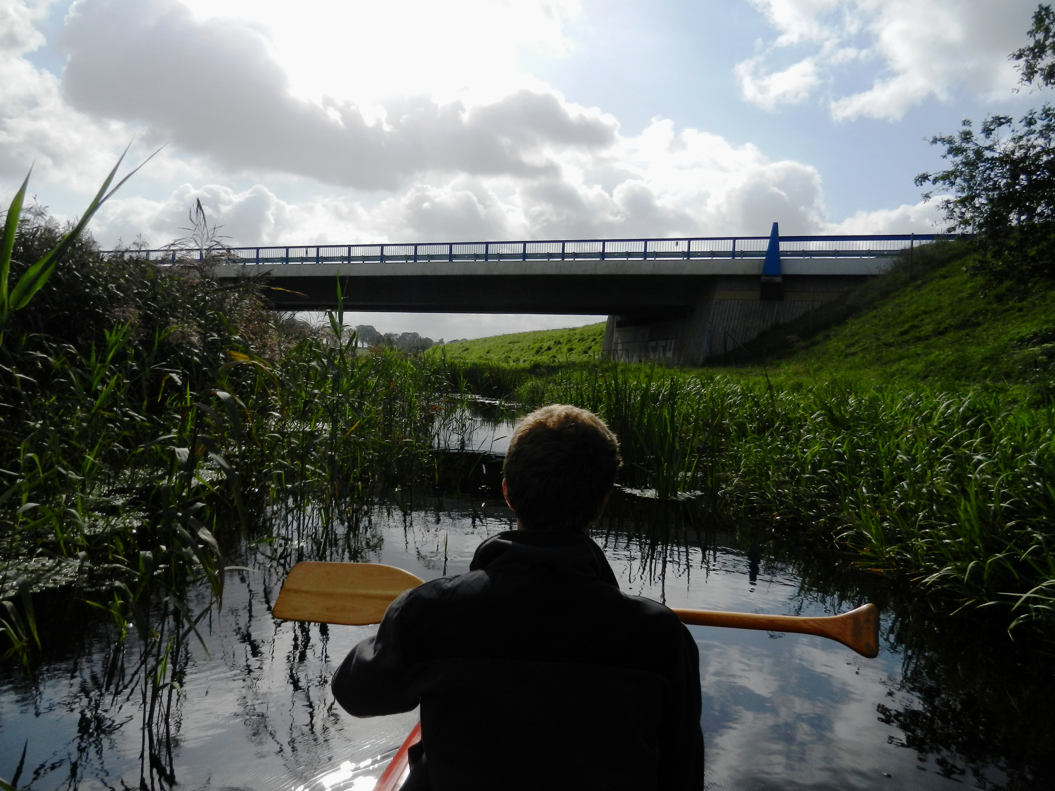 Straßenbrücke B104 (dreispurig) über den Aubach bei Schwerin